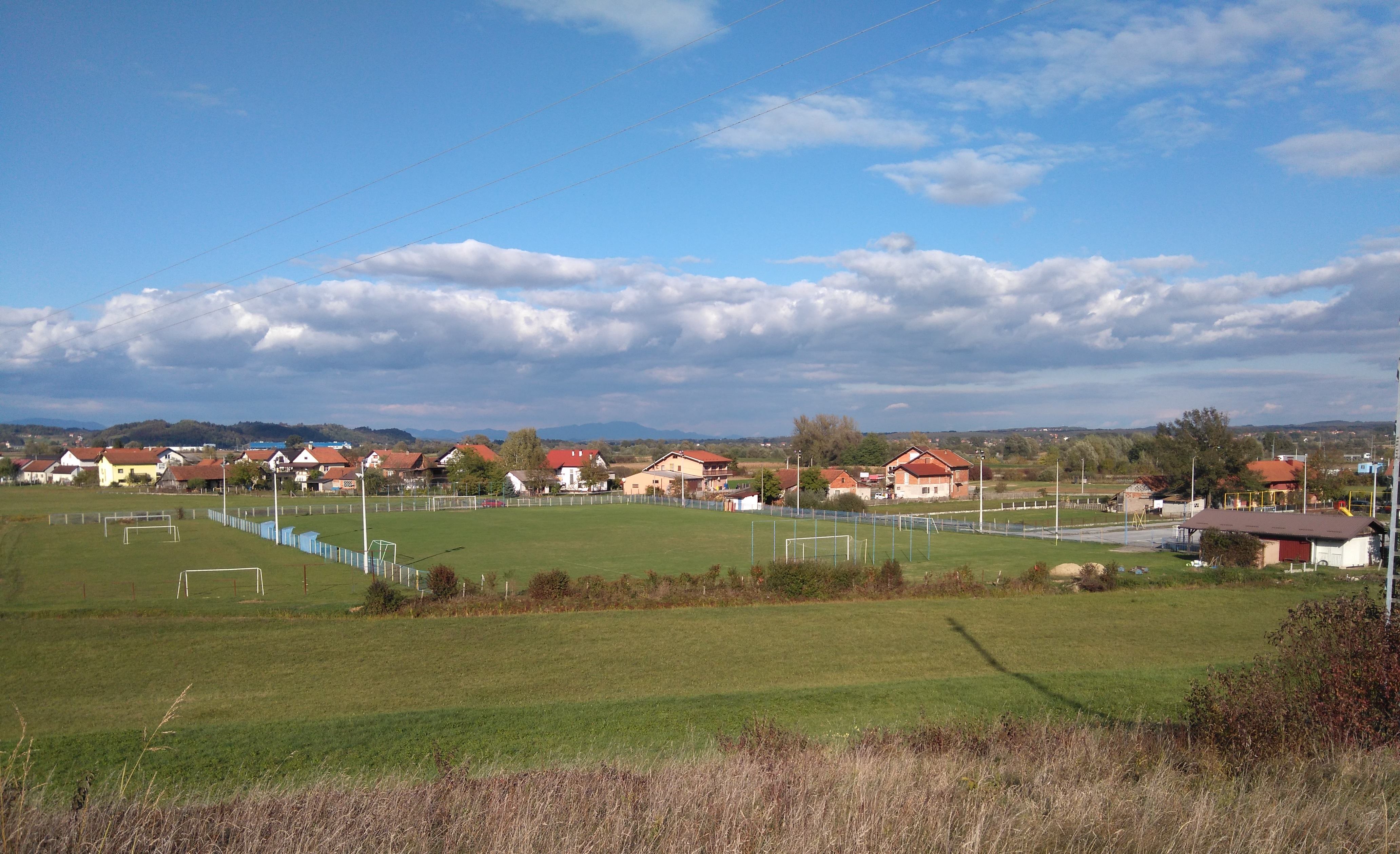 Igralište Nk Zaprešića u Kupljenovom